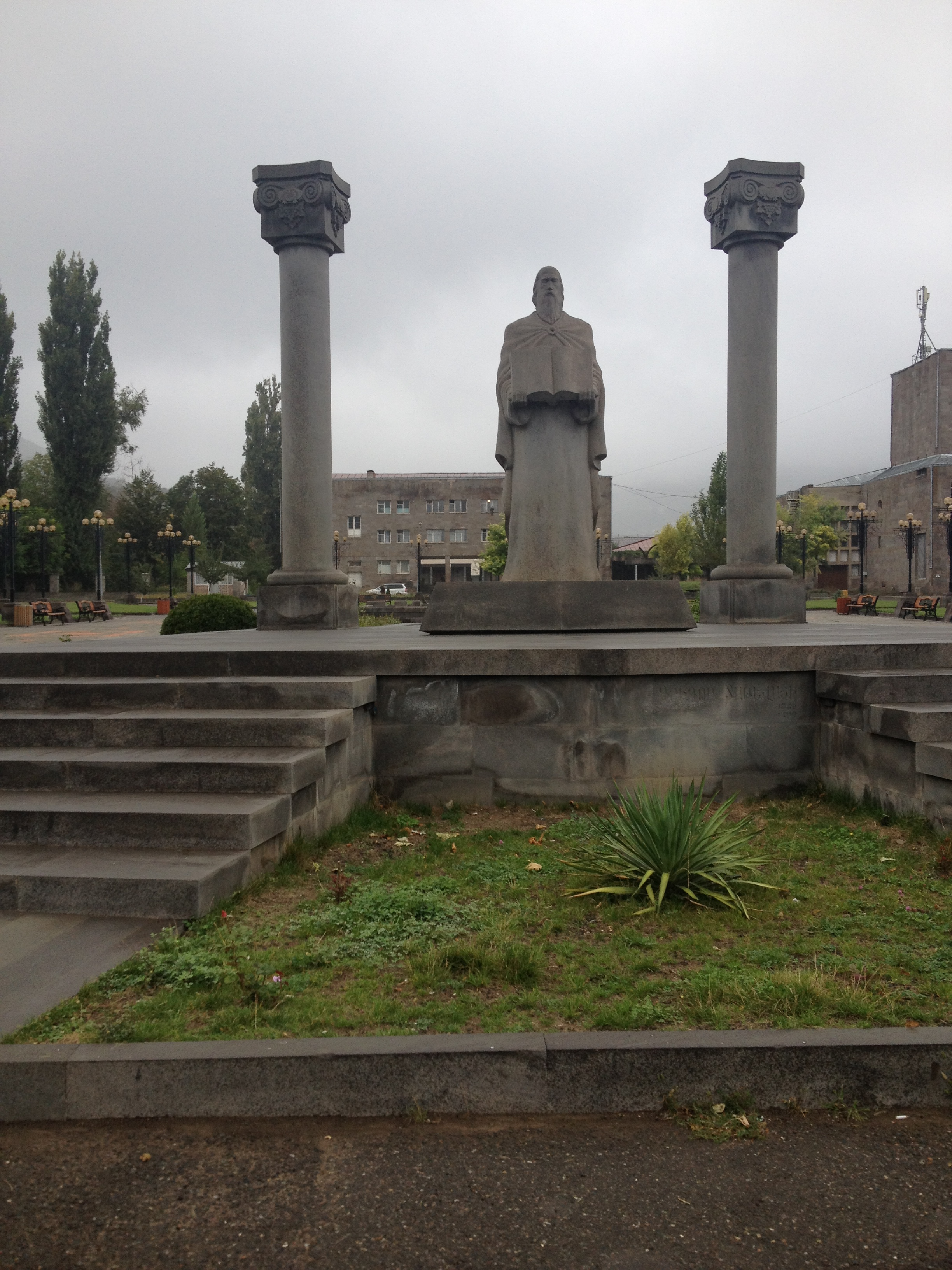 Գրիգոր Տաթևացու հուշարձանը Գորիսում՝ Գրիգոր Տաթևացու անվան հրապարակում